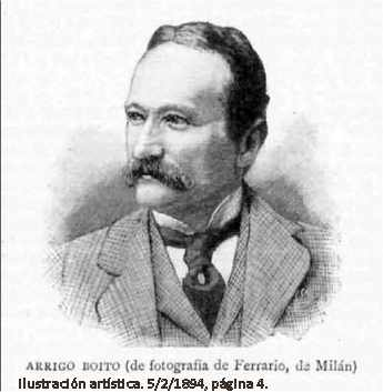 Arrigo Boito